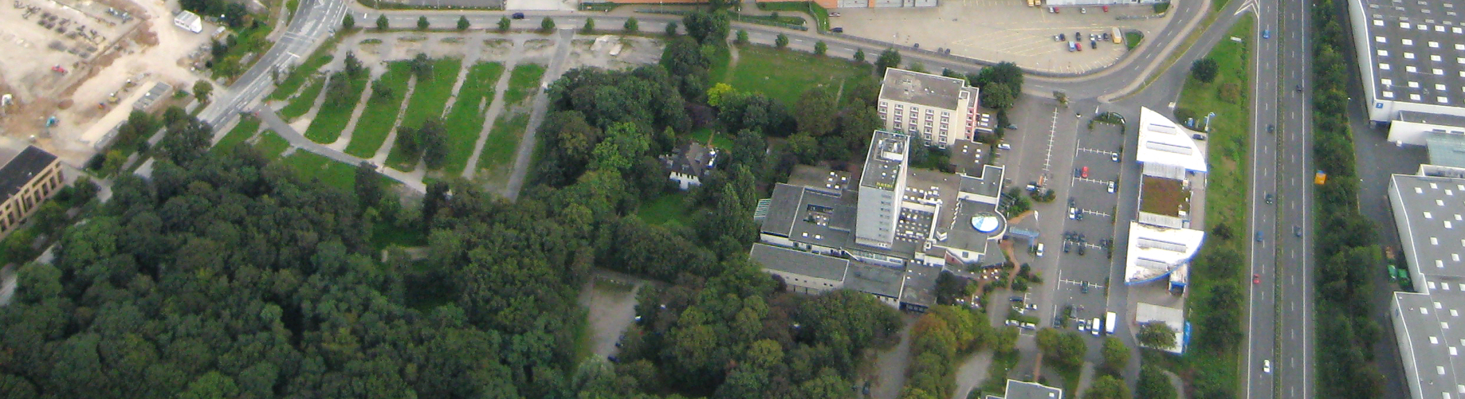 Gelände der Expo 2000 in Hannover im Jahr 2007